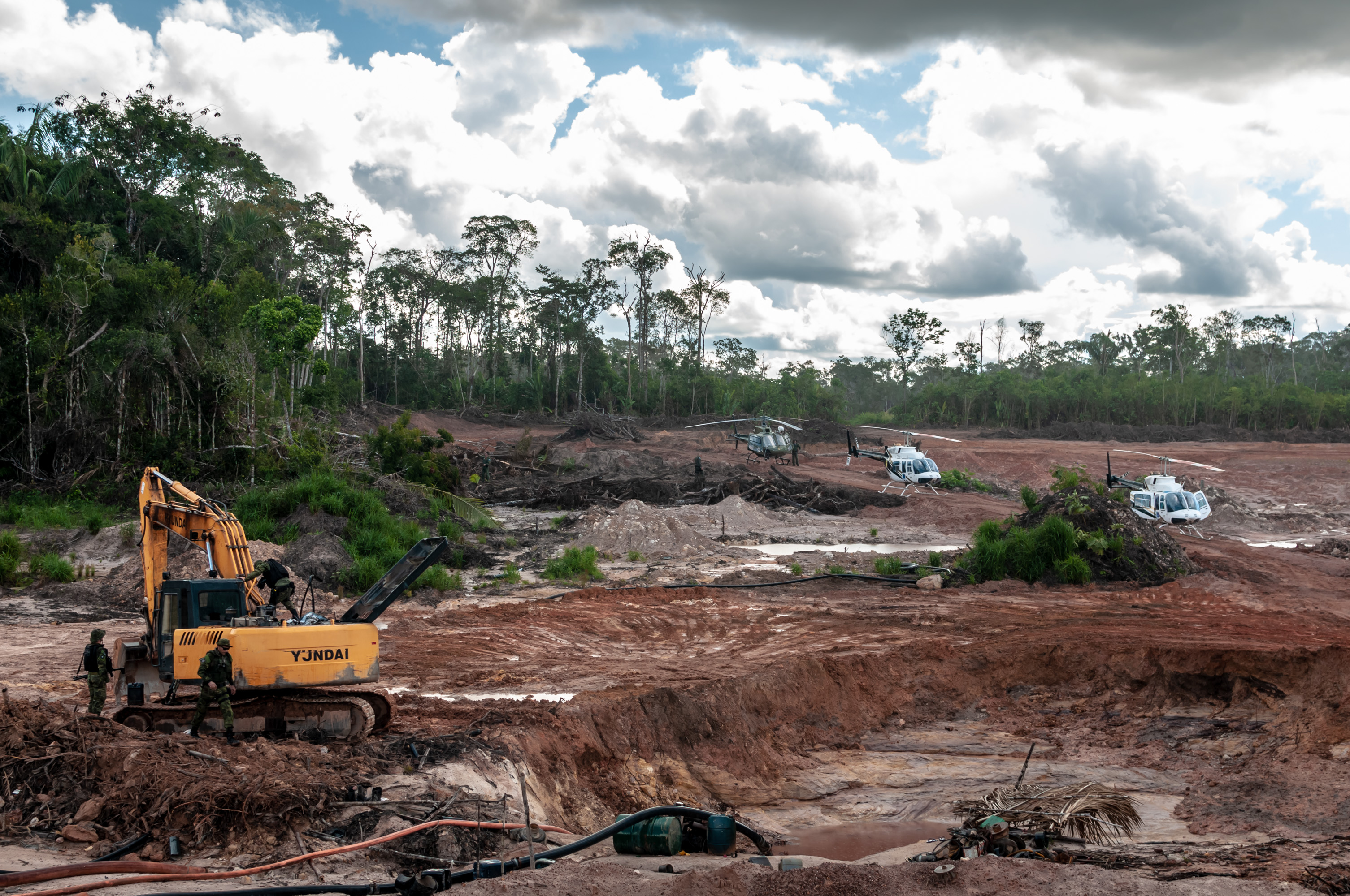 Grupo Especializado de Fiscalização (GEF) do Ibama combate desmatamento e garimpo de cassiterita na Terra Indígena Tenharim do Igarapé Preto, Amazonas Foto: Vinícius Mendonça/Ibama Mais informações